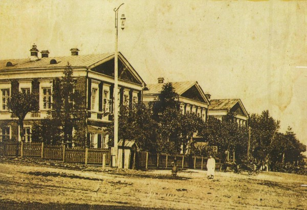 Земская больница в Нижнем Тагиле, была создана Кузнецким Петром Васильевичем в 1884 году.